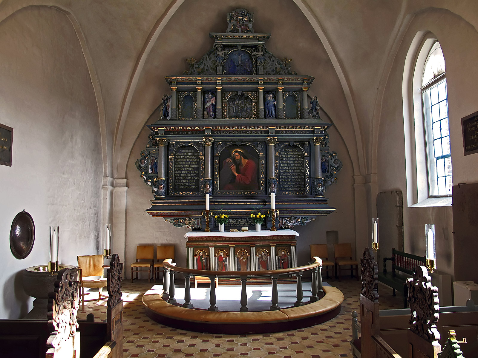 Altertavlen er fra 1614. Alterbordet under altertavlen er fra 1584.